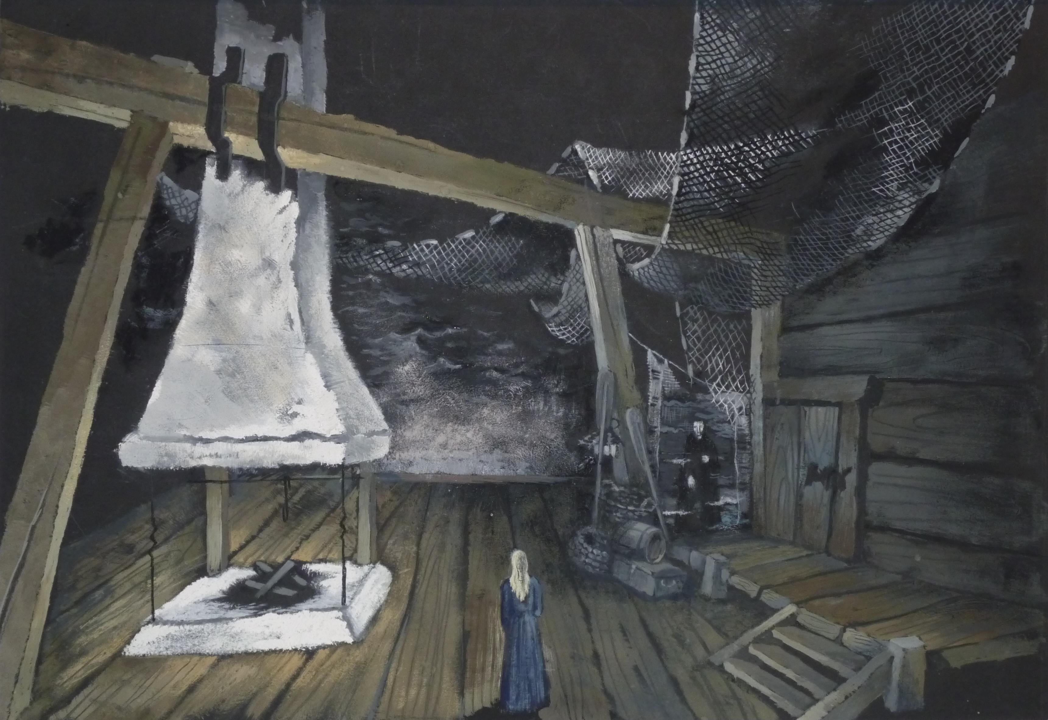 Bühnenbildentwurf von Helmut Jürgens für "Der Fliegende Holländer" von R. Wagner, 2. Akt, Aufführung München 1950